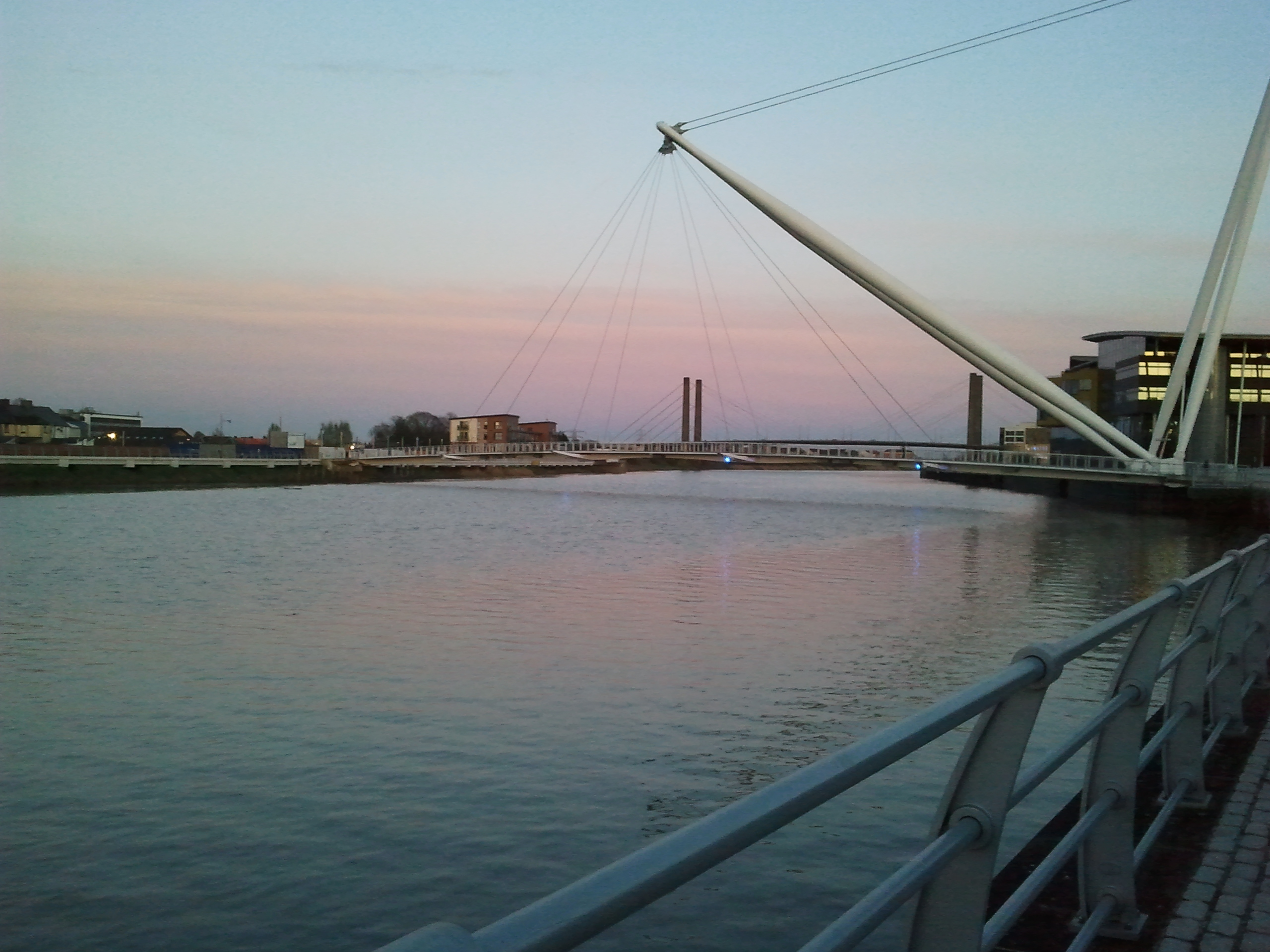 river usk newport